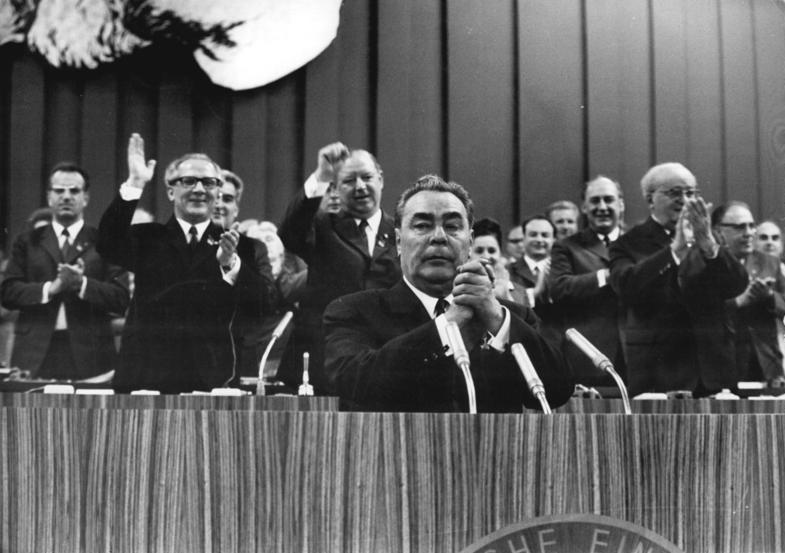 ADN-ZB Kollektiv 16.6.71-pe-Berlin: VIII. Parteitag - Rede Breshnews- Mit stürmischem Beifall nahmen das Präsidium und die Delegierten die bedeutsame Rede des Generalsekretärs des ZK der KPdSU, Leonid Iljitsch Breshnew (Mitte) am zweiten Beratungstag des VIII. Parteitags auf. Unser Foto zeigt im Hintergrund in der ersten Reihe des Präsidiums Erich Honecker, Erster Sekretär des ZK der SED, und die Mitglieder des Politbüros des ZK Gerhard Grüneberg und Friedrich Ebert - v-l-n-r-. (VIII C) Reporter: Koard siehe ADN-Meldung!